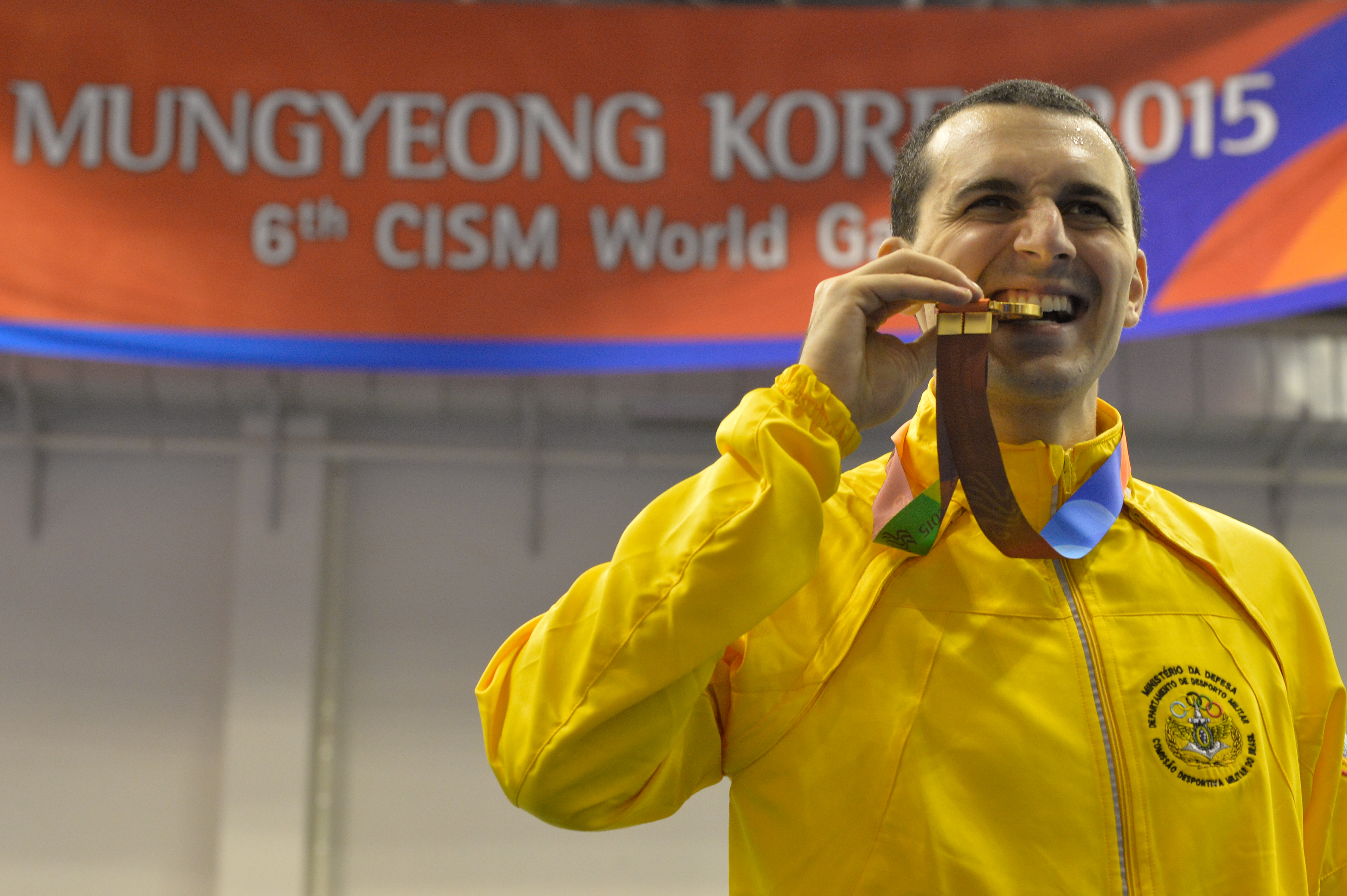 Renzo Agresta ganha medalha de outro no 6º Jogos Mundiais Militrares. Foto: Felipe Barra